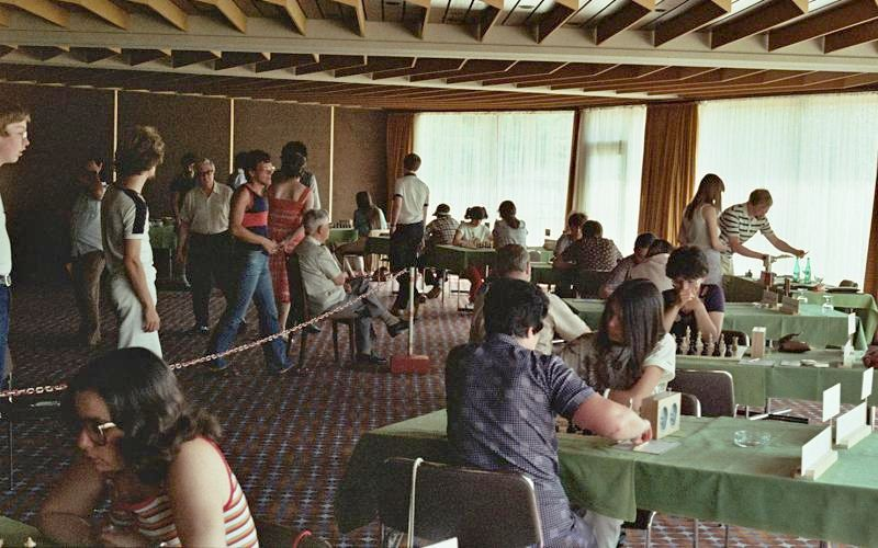 Der Turniersaal des Interzonenturnieres 1982 in Bad Kissingen